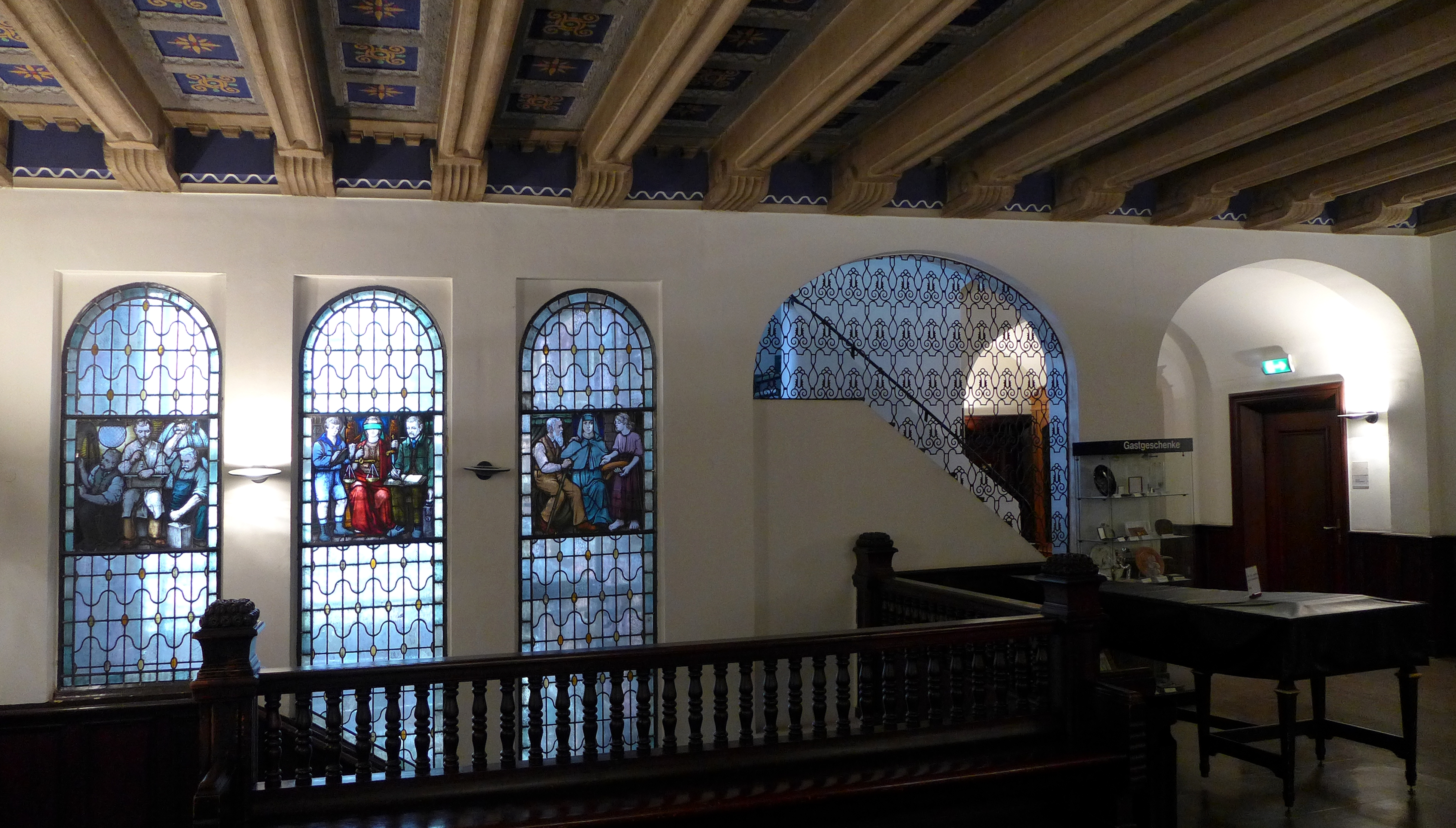 Rathaus Buxtehude, Flur im Obergeschoss. Gebäude erbaut in 1914 nach Plänen des Architekten Alfred Sasse (Hannover) als Ersatz für das durch Brand zerstörte mittelalterliche Rathaus und unter Verwendung von Ausstattungselementen aus dem 16. Jahrhundert des Vorgängerbaues. Im Bild zu sehen: hölzerne Balustrade, Glasmalereien und Bleiverglasung, Eisengitter in Kunstschmiedeausführung, hölzerne Decke mit Malereien in den Gefachen.